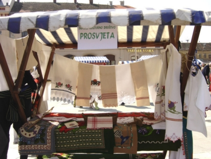 "Šarana jaja bojama grada", Osijek, 8. IV. 2006, Srpsko kulturno društvo "Prosvjeta", Pododbor Osijek